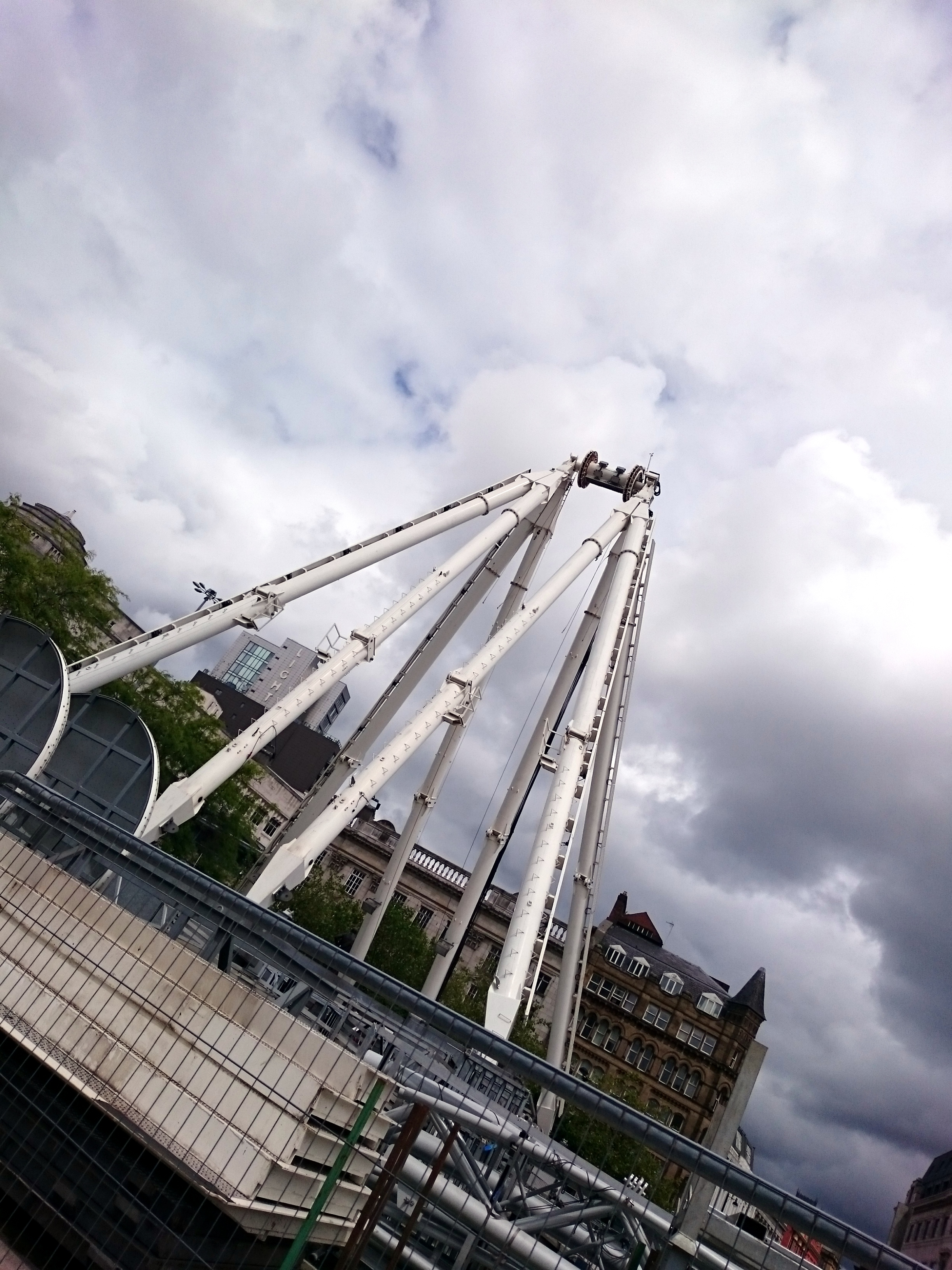 Manchester, UK